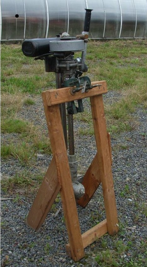 Ein Seagul påhengsmotor, utstilt på Norsk traktor og motormuseum den 5/9-2009.